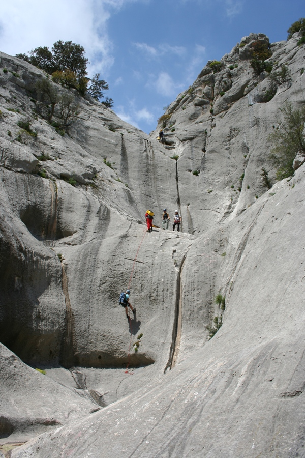 Badde Pentumas (Valle di Lanaitto - Italia)